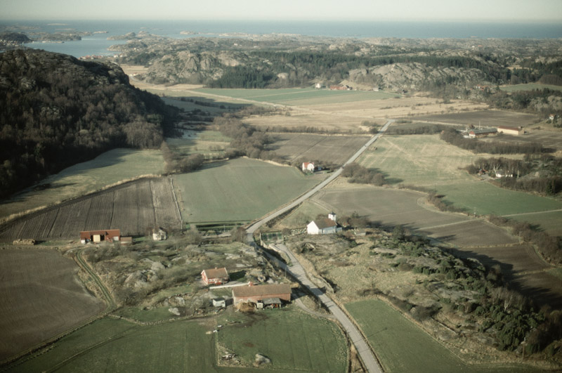 Bottna kyrka i Bottnadalen Motiv: Bottna Nyckelord: Flygbilder, Riksintressen Kategori: Dalgångsbygd, Kyrkomiljö Bottna kyrka i Bottnadalen.